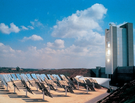 מתקן סולארי